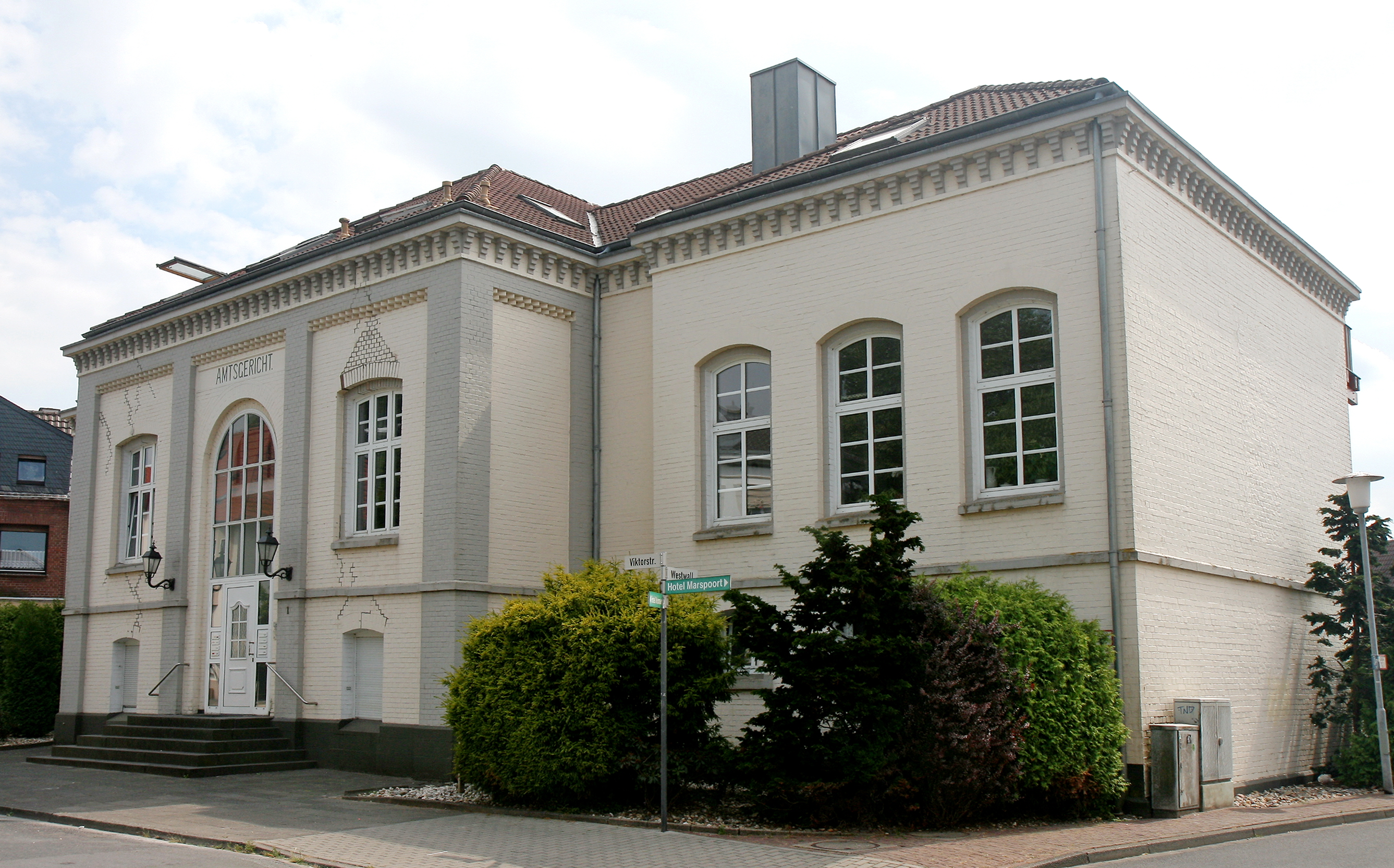 Ehemaliges Amtsgericht in Xanten, Viktorstraße 1 This image shows a heritage building in Germany, located in the North Rhine-Westphalian city Xanten (no. 24).